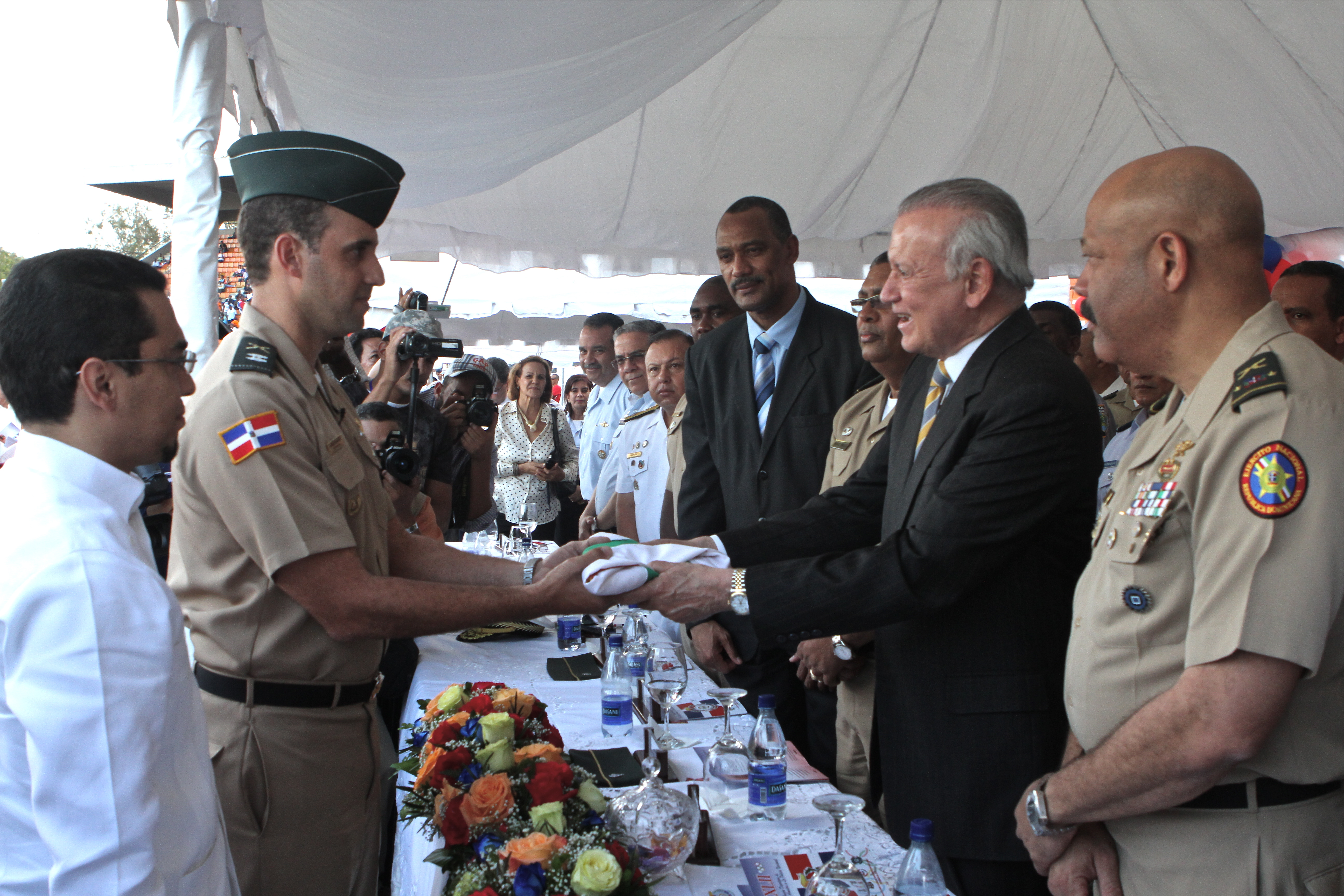 Recibiendo la bandera del Ejercito de La República Dominicana para ser llevada a La Cima del Everest , de parte del vicepresidente de la República el Sr. Rafael Alburquerque